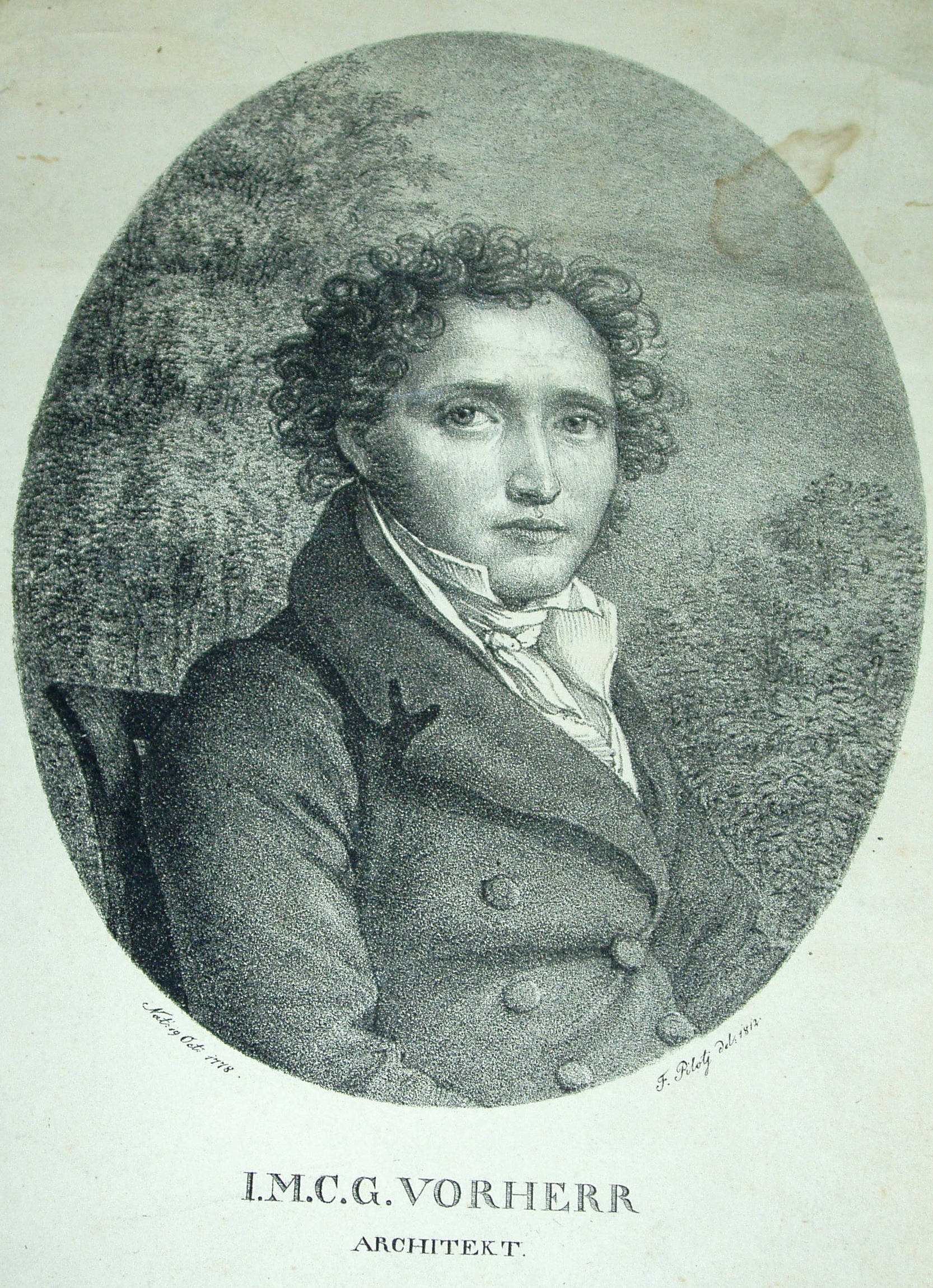 Kupferstich